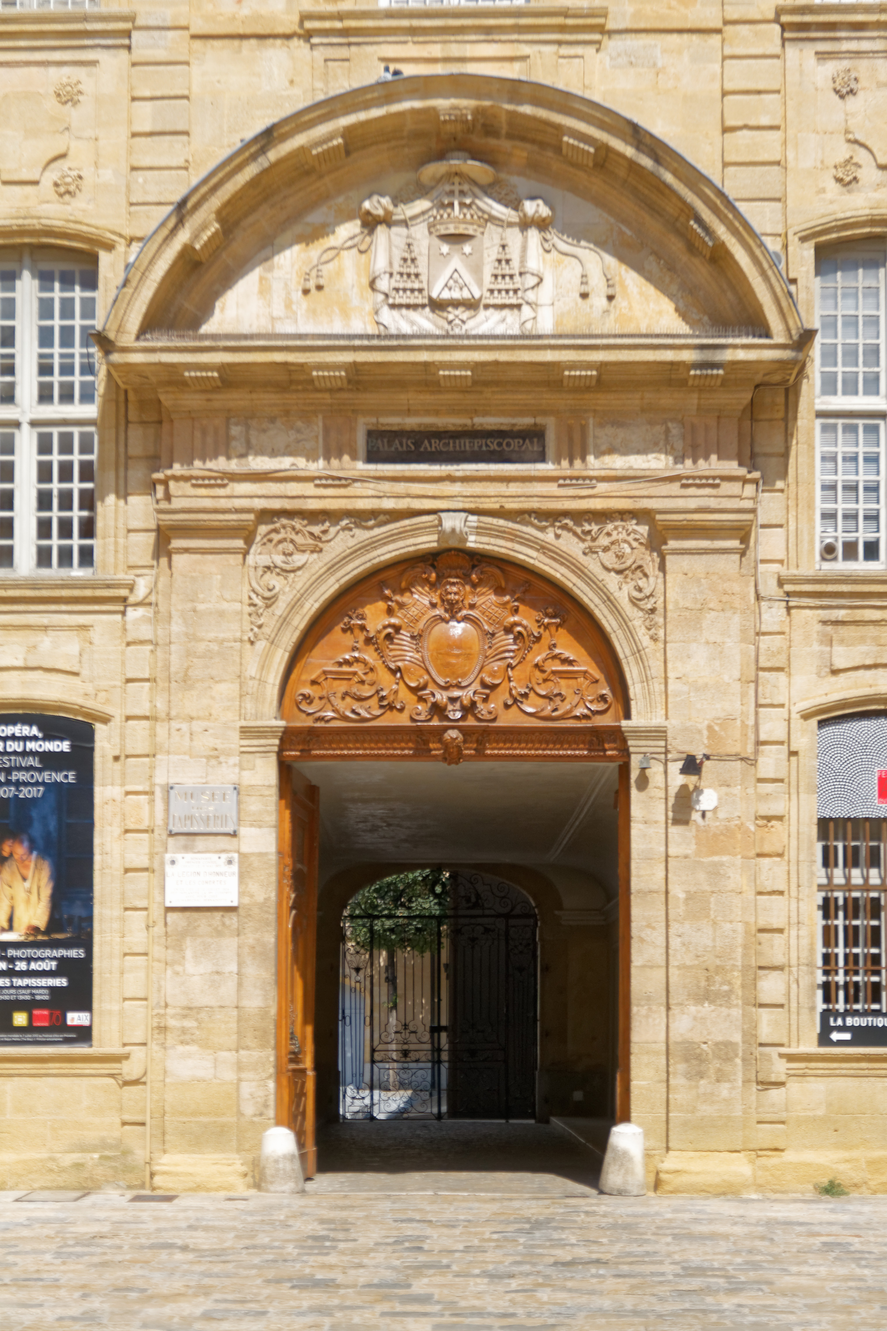 Erzbischöfliches Palais in Aix-en-Provence, Hauptportal